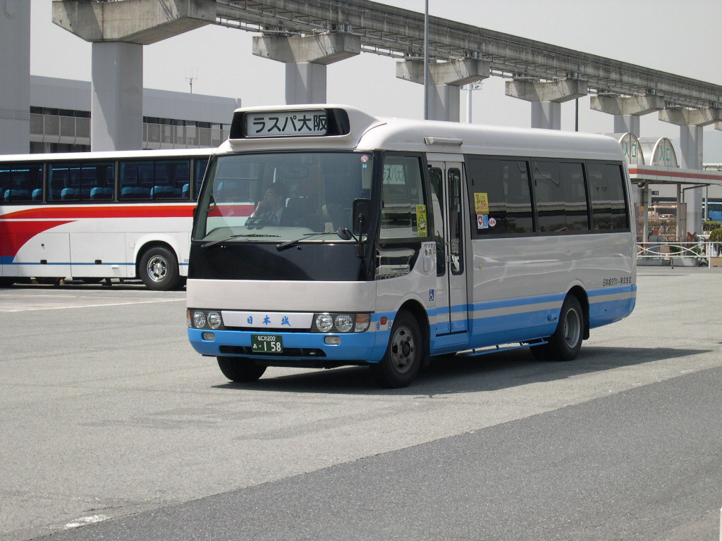 大阪空港にて撮影